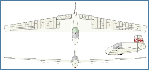 Marske Pioneer 1a